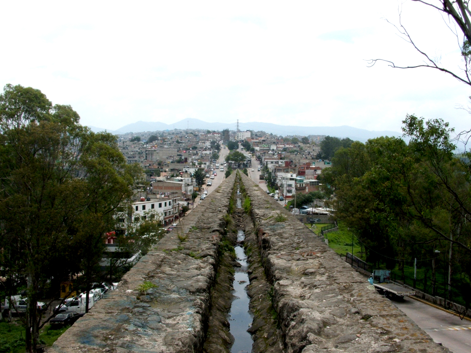 Acueducto de los Remedios, Nuacalpan, Estado de México